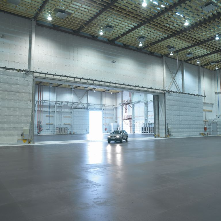 Vista de uno de los platos de la Ciudad de la Luz (2300 m²)